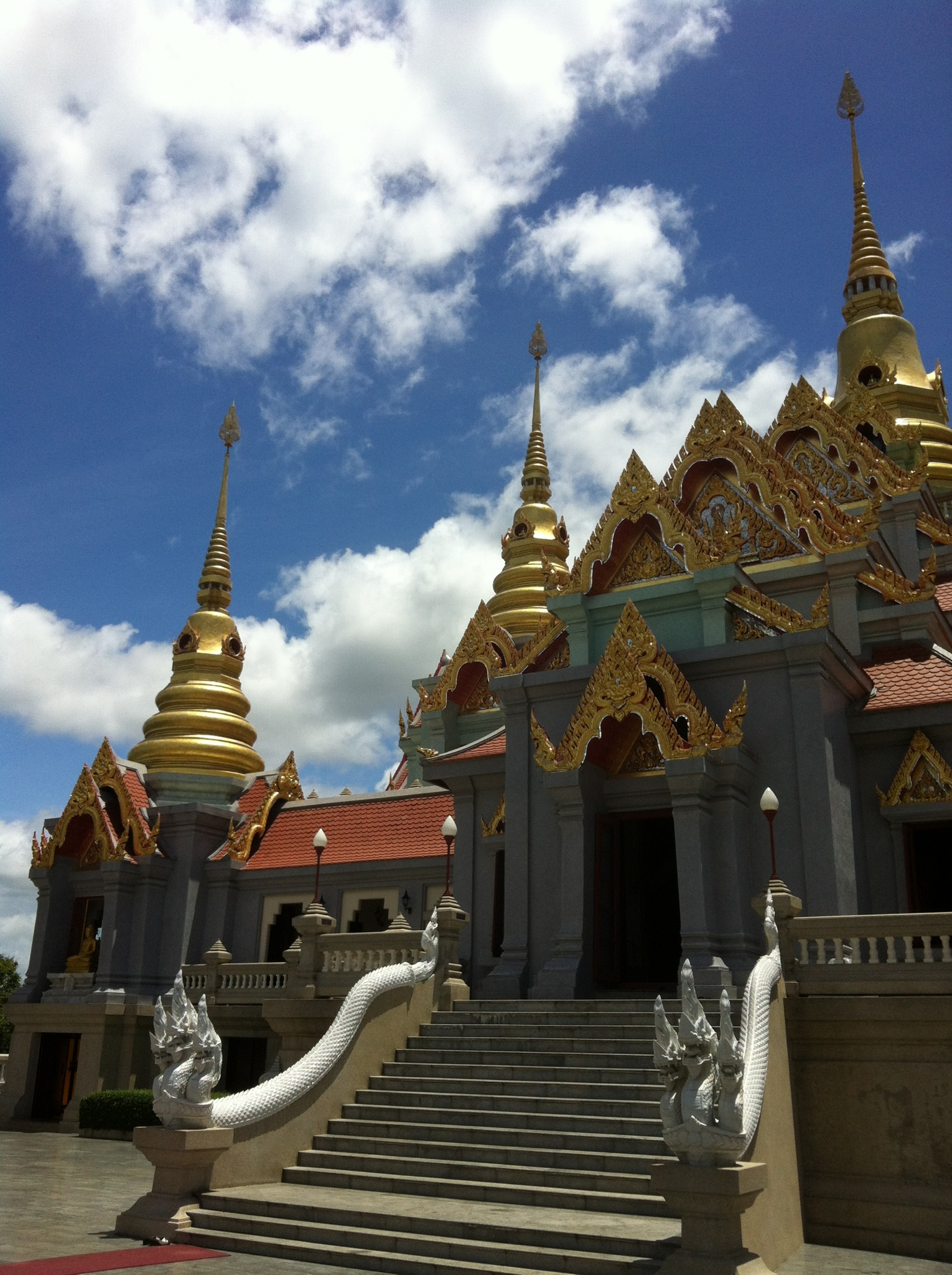 Thong Chai, Bang Saphan District, Prachuap Khiri Khan, Thailand